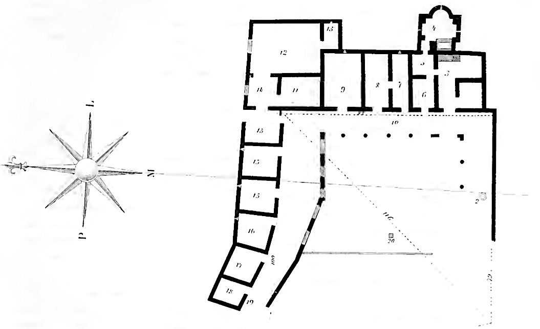 Pianta di Villa del Filosofo disegnata da Francesco La Vega nel 1778